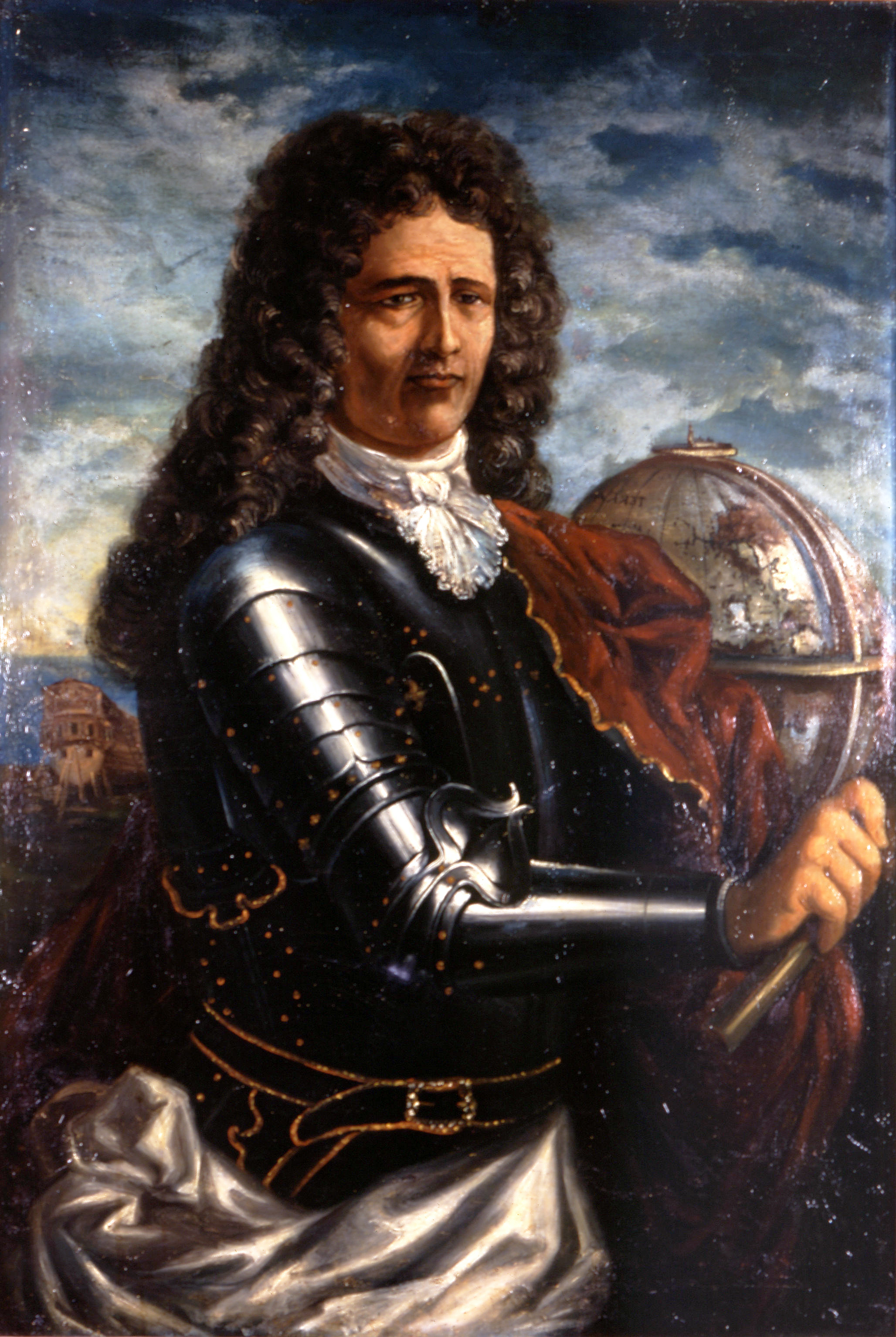 Retrato del marino español José Antonio de Gaztañeta e Iturribalzaga (1656-1728), que fue teniente general de la Real Armada Española. El cuadro es una copia anónima realizada hacia 1847 a partir de un original del pintor holandés Landsberghs, que fue pintado en 1718 cuando Gaztañeta tenía 62 años, y que en la actualidad se conserva en la Colección Casa Arrietakua de Motrico (Guipúzcoa).